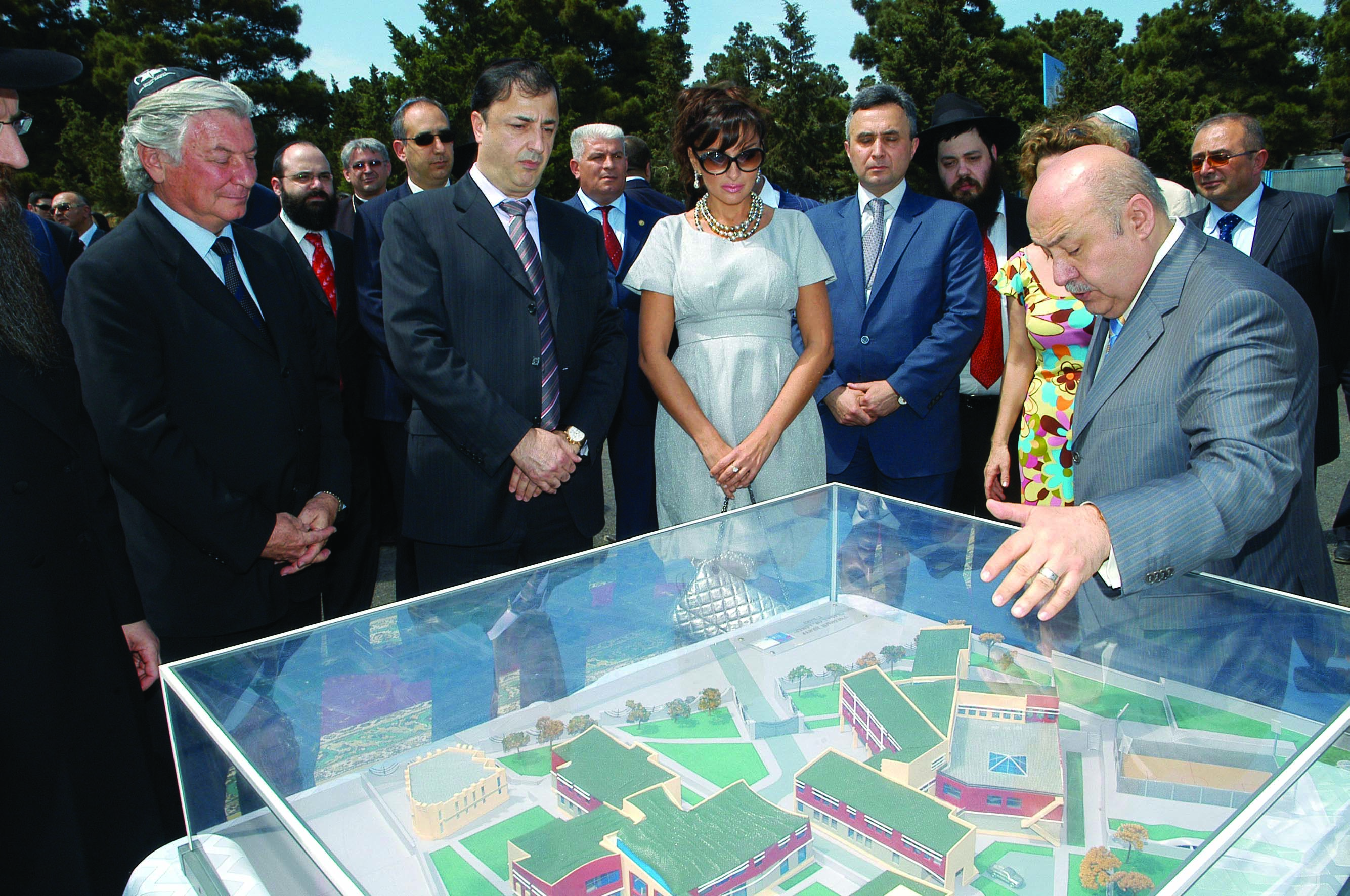 “Xabad-Or-Avner” təhsil mərkəzinin binasının təməlqoyma mərasimi.31 may 2007-ci il